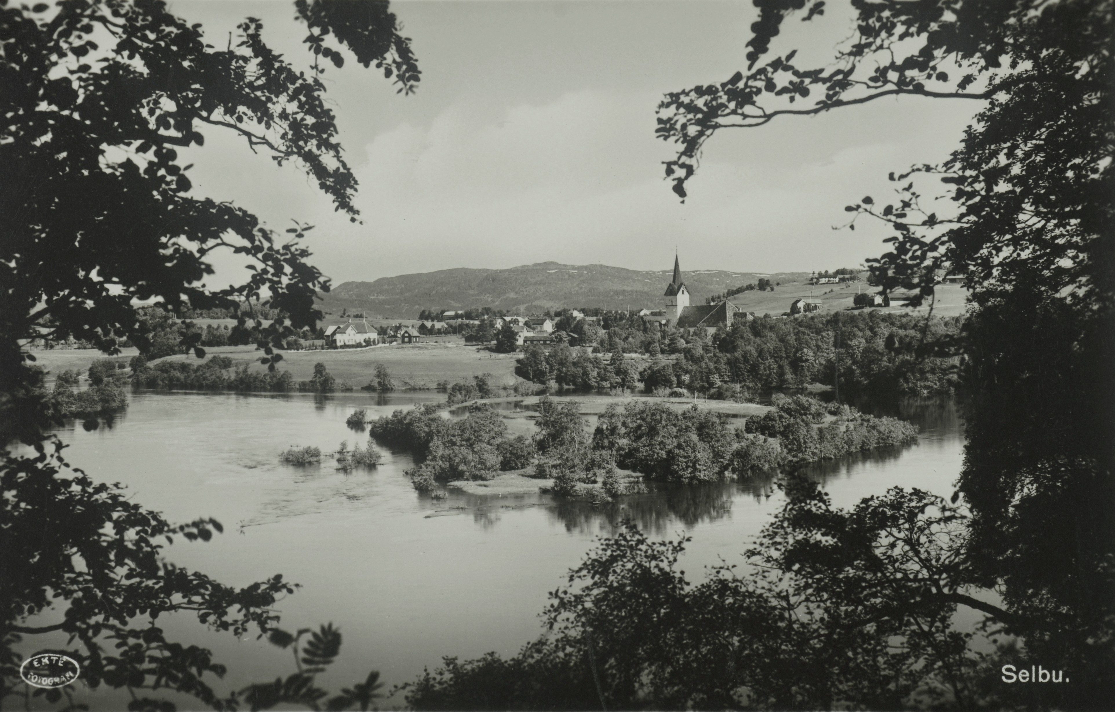 Parti fra Selbu, med elva Nea (korrigert! neppe Selbusjøen) i forgrunnen, ca. midt i bildet Selbu kirke.